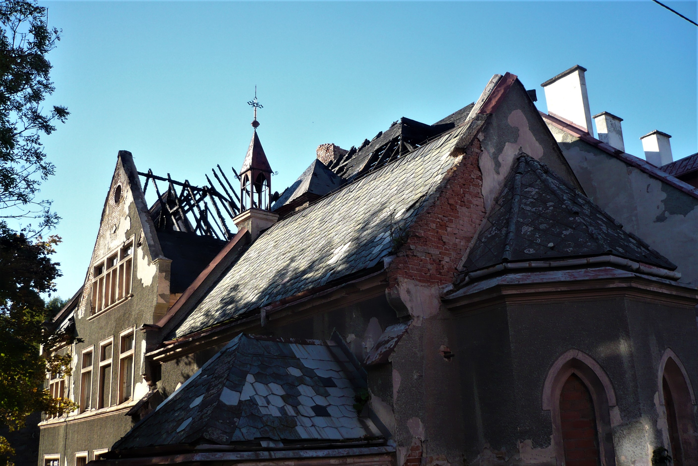 Szpital miejski w Nowej Rudzie